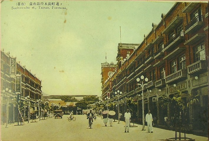 臺南銀座末廣町通